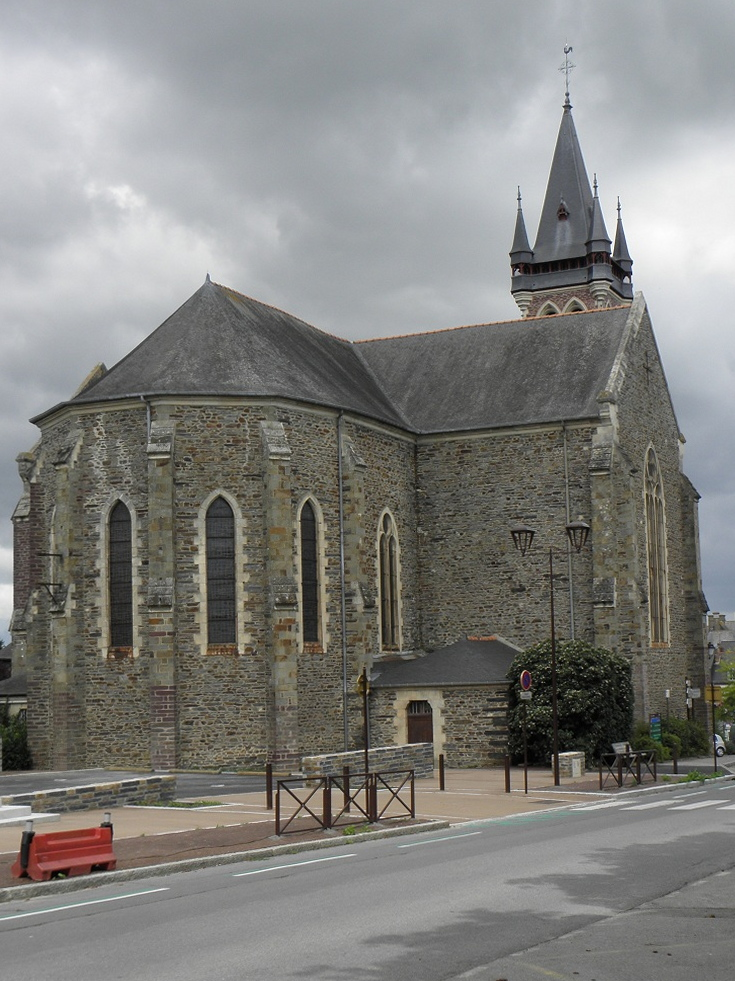 Église Sainte-Marie-Madeleine de Châteaugiron (35). Chevet.